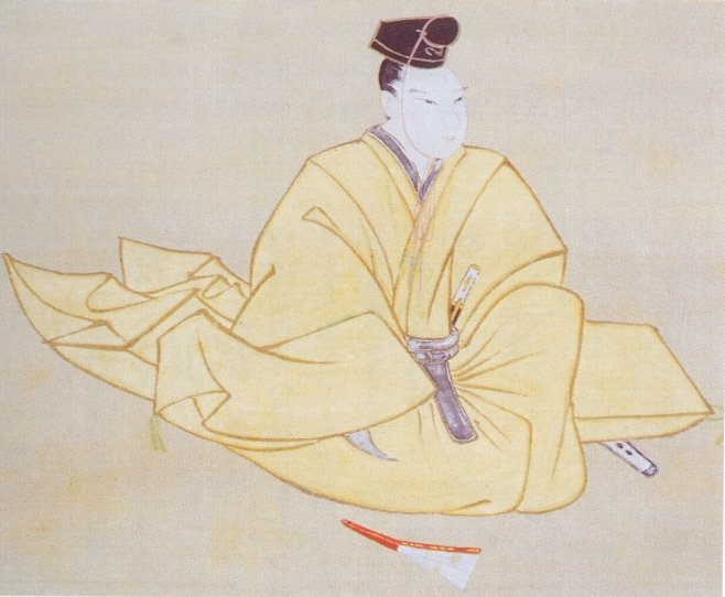 酒井忠恭。江戸時代の大名。Sakai Tadazumi was Daimyo of Japan at Edo Period.